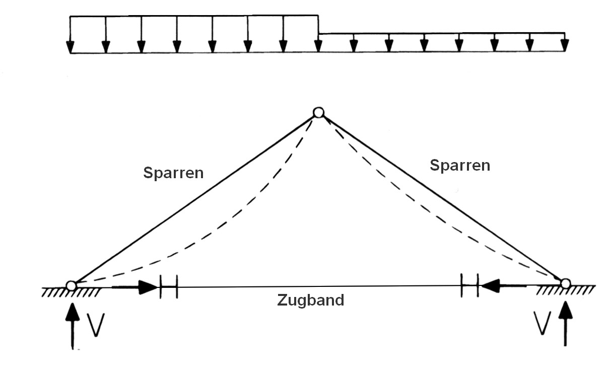 Statisches System eines Gespärres, selbst erstellt, 2002